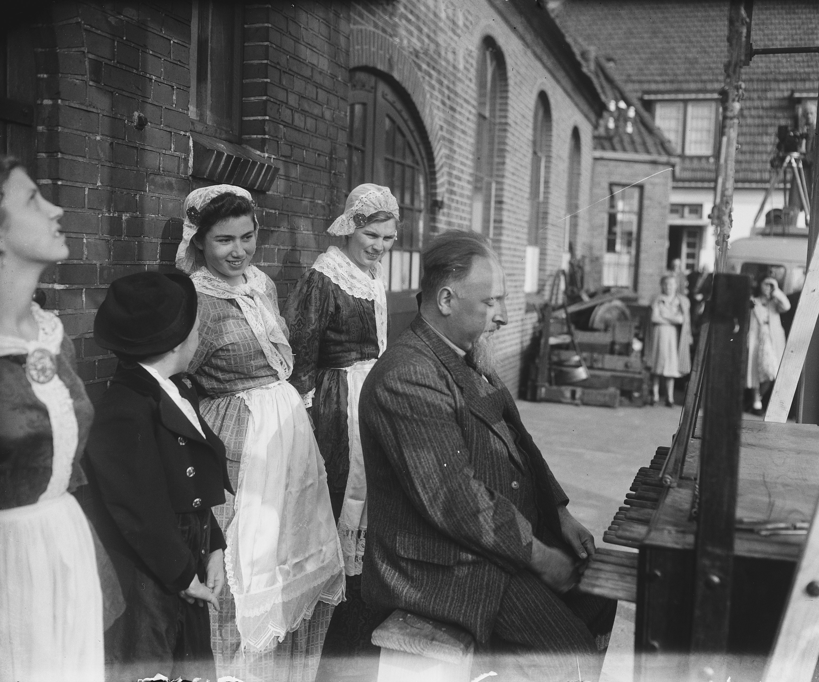 Collectie / Archief : Fotocollectie Anefo Reportage / Serie : [ onbekend ] Beschrijving : Carillon voor Sint Maarten Church in New York Annotatie : Opgesteld voor de klokkengieterij St Paulinus (Gebr. van Bergen) te Heiligerlee. Wordt hier bespeeld door een beiaardier Datum : 10 oktober 1949 Locatie : Heiligerlee Trefwoorden : carillons Instellingsnaam : Sint-Maartenskerk Fotograaf : Merk, Ben / Anefo Auteursrechthebbende : Nationaal Archief Materiaalsoort : Glasnegatief Nummer archiefinventaris : bekijk toegang 2.24.01.09 Bestanddeelnummer : 903-6479 Reacties Geplaatst door Geschiedenismens - Jazzmuziek op 27 mei 2017 - 18:46. Mechelse beiaardier Staf Nees (1901-1965) keurt het carillon. Persoonsnaam: Nees, Staf (voluit Gustaaf)